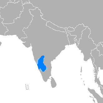 Donde es mayoritario Donde es minoritario